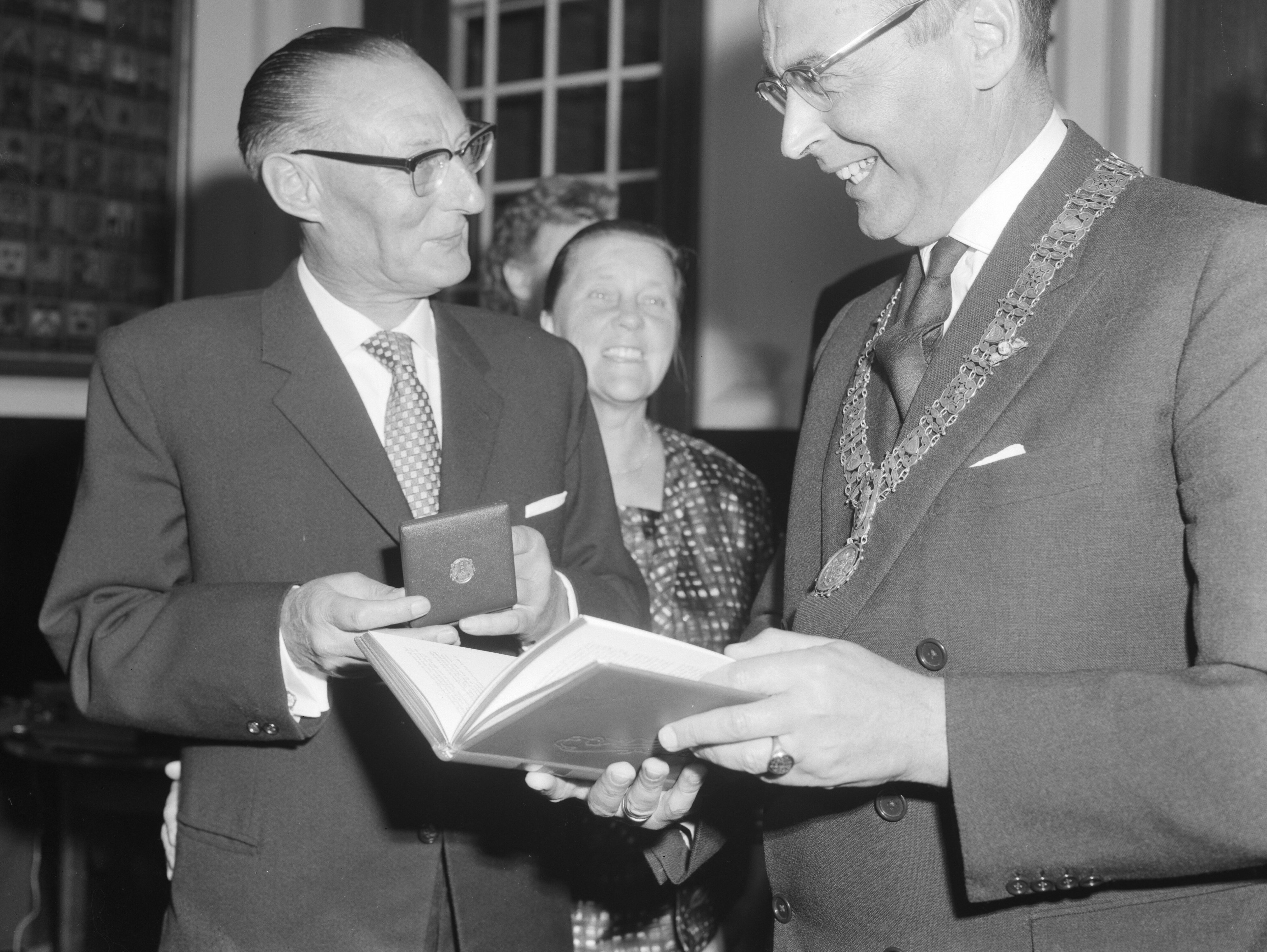 Collectie / Archief : Fotocollectie Anefo Reportage / Serie : [ onbekend ] Beschrijving : Jan Mens kreeg zilveren medaille van stad Amsterdam voor zijn miljoenste exemplaar Datum : 17 september 1962 Locatie : Amsterdam, Noord-Holland Trefwoorden : medailles, zilver Persoonsnaam : Mens, Jan Fotograaf : Bilsen, Joop van / Anefo Auteursrechthebbende : Nationaal Archief Materiaalsoort : Negatief (zwart/wit) Nummer archiefinventaris : bekijk toegang 2.24.01.04 Bestanddeelnummer : 914-3194